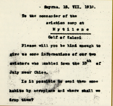 Σημείωμα (στα αγγλικά) που έριξαν με ερματισμένο φάκελο αεροπόροι της Οθωμανικής Αεροπορίας πάνω από τη Χίο στις 15 Ιουλίου 1918 και ζητούν πληροφορίες για την τύχη συναδέλφων τους. Στο σημείωμα απάντησε ο Αριστείδης Μωραϊτίνης με τον ίδιο τρόπο τις επόμενες ημέρες.